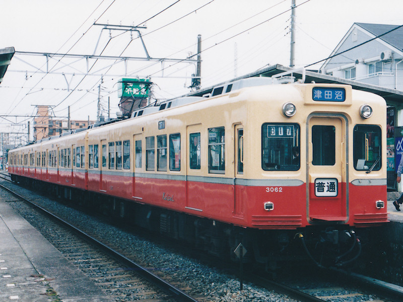 京成3050形電車（3062編成・赤電色復元編成）撮影：検見川駅